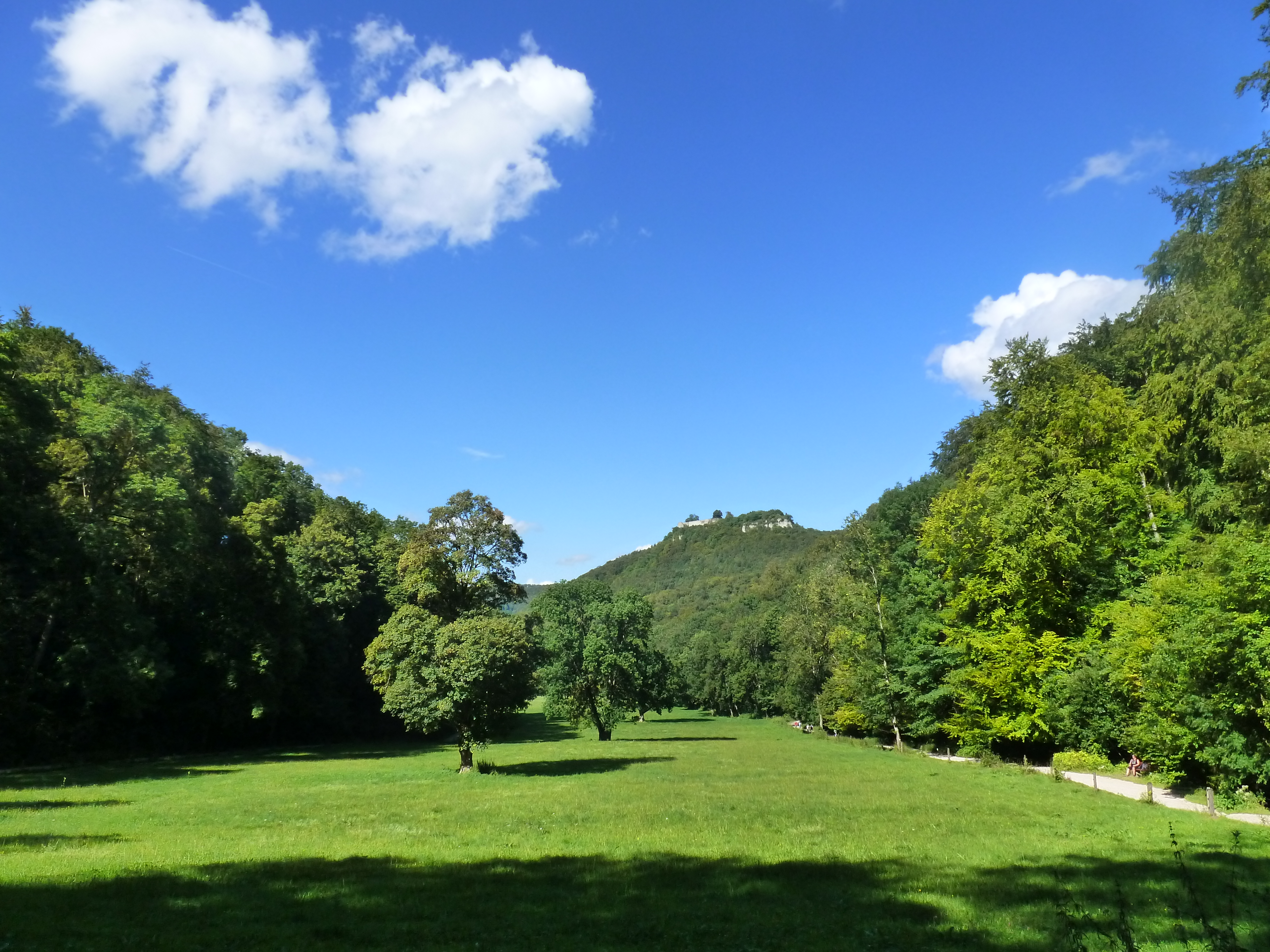 Das Tal des Brühlbaches bei Bad Urach. Im Hintergrund die Burg Hohenurach.